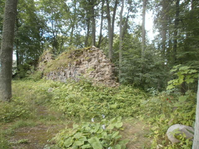 Idakülg kirdesuunal.